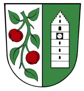 Wappen der ehemaligen Gemeinde Ailingen (heute Ortschaft von Friedrichshafen)